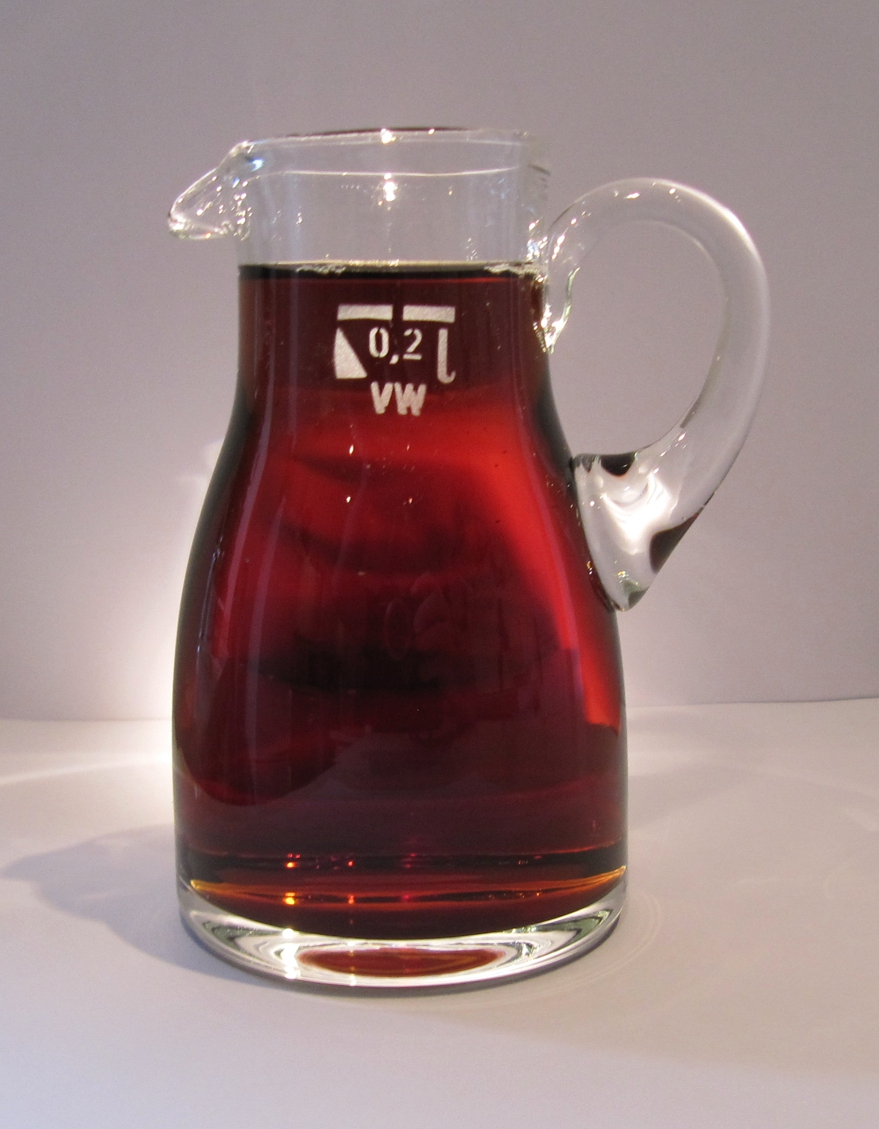 Eichstrich_Karaffe_1